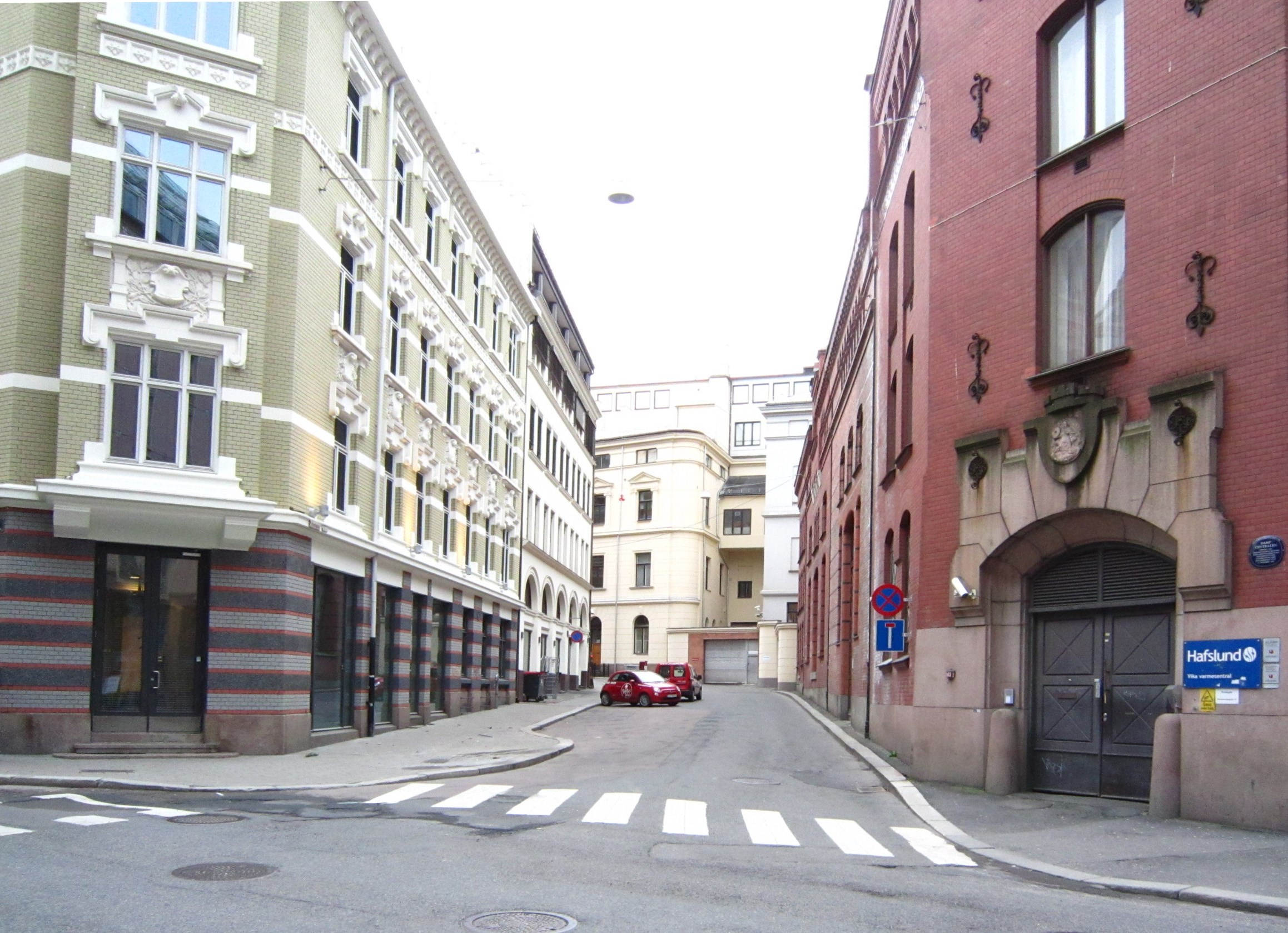 Prestegata i Oslo sentrum